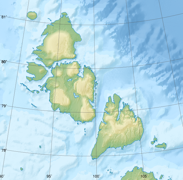 Физическая карта архипелага Северная Земля. Координаты и проекция для GMT: -JA99/78.5/4i -R89.9/77.3/113.6/81.3r Проекция: Lambert Azimuthal Equal-Area Longitude and latitude of the projection center: 99° E / 78.5° N Инструменты: GMT.